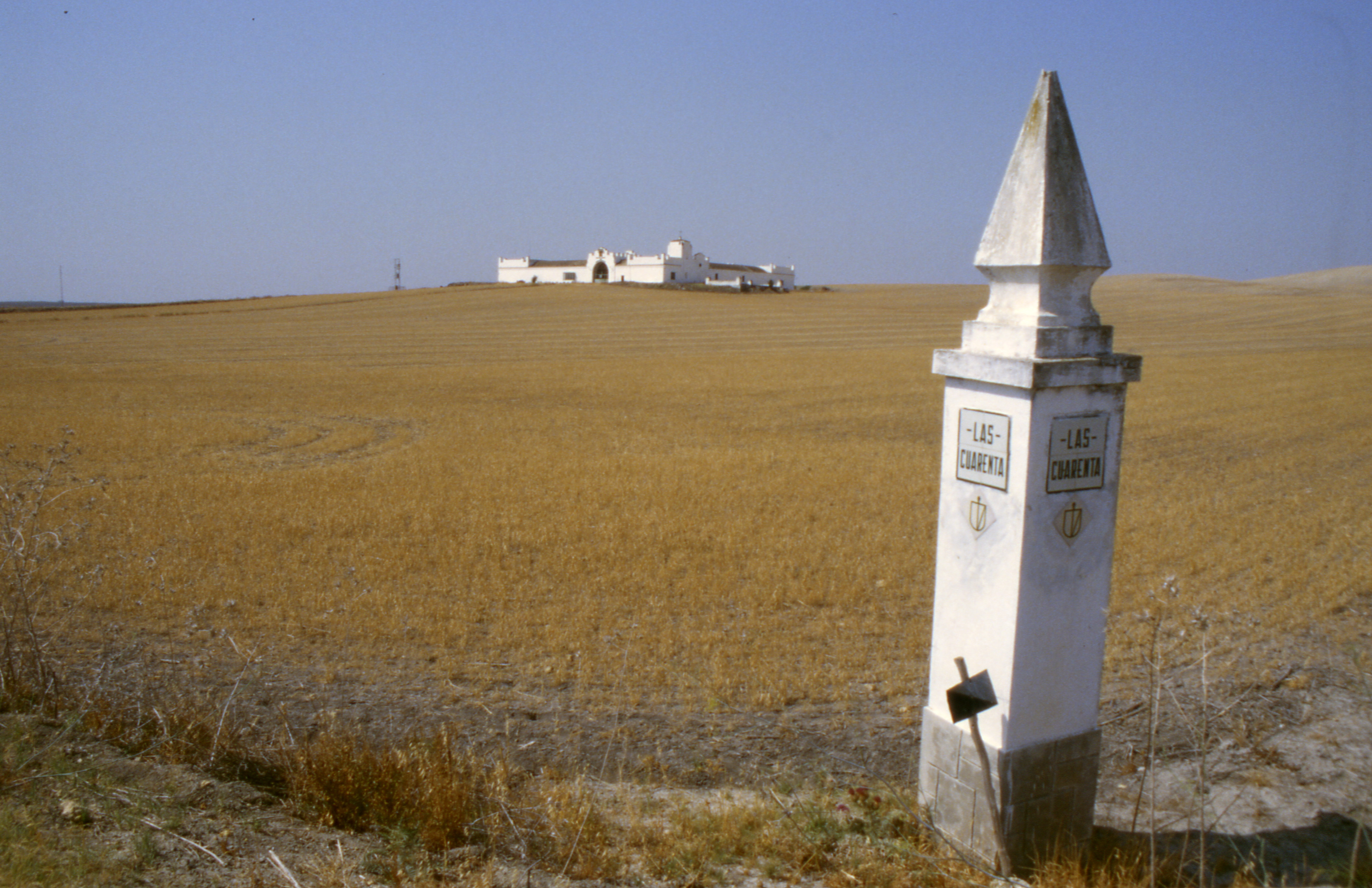 AndalusienLandschaftBeiCarmona